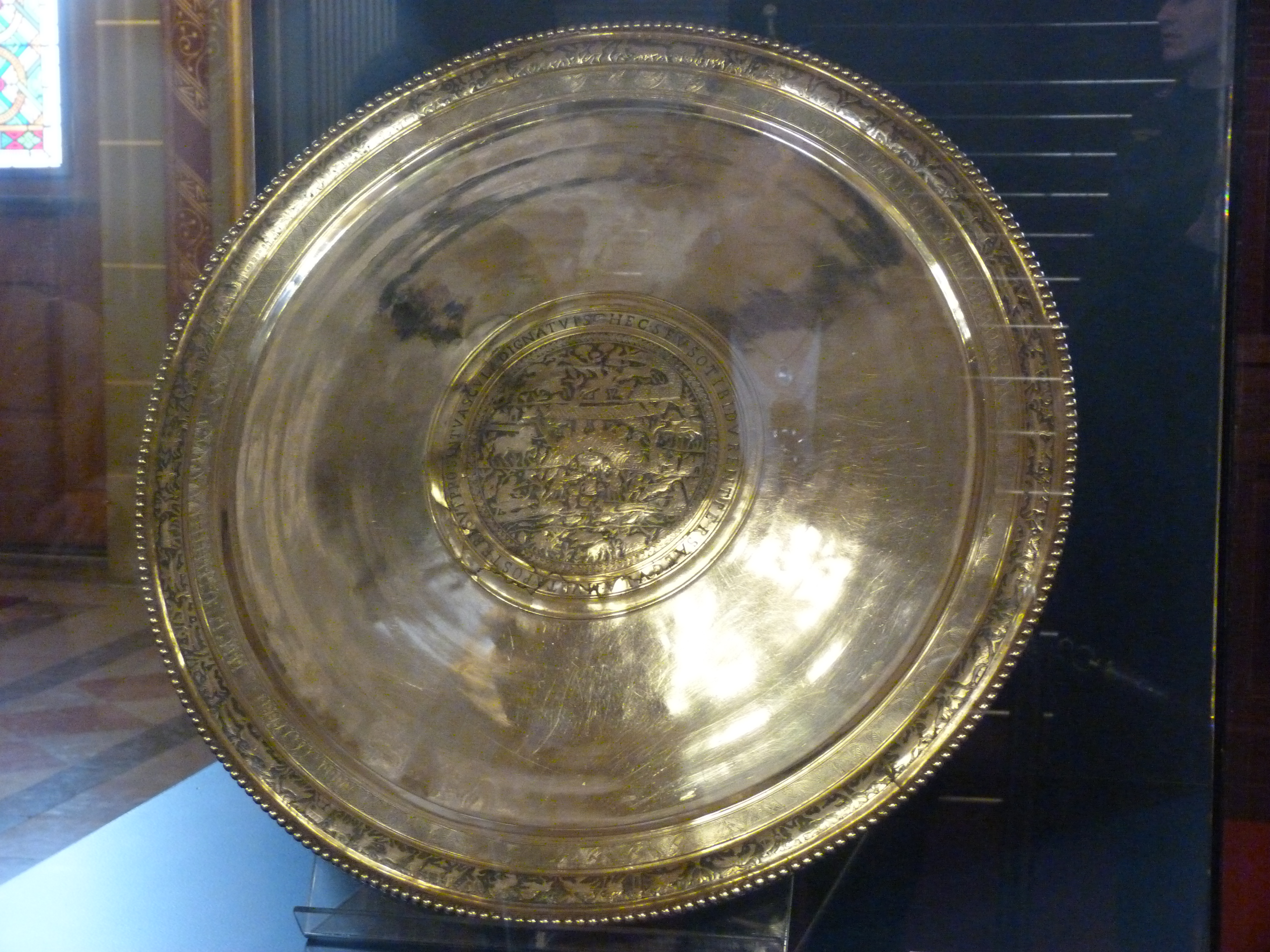 Maradjanak meg neked sok évszázadon át ezek az edények, Seuso, és utódaidnak is méltón a hasznára váljanak. A felvétel 2014. április 2 -án készült Budapesten, az Országházban. 2014. március 26 –án szerdán, rendkívüli sajtótájékoztatón jelentette be Orbán Viktor, hogy Magyarország visszaszerezte és hazaszállította a Seuso kincs hét darabját, mely három hónapon át megtekinthető az Országházban. A Seuso kincs késő császárkori ünnepi lakoma ezüst készlet. Tulajdonosa, Seuso a 4. század végén, 5. század elején rejthette el a Polgárdi szőlőhegyen. Ez a terület a Balatonnal határos volt abban az időben. A ma ismert és fennmaradt, késő császárkori kincsleletek közül ez a legértékesebb. Seuso tál, tisztálkodáshoz használt edények. Baán László. Források: A Seuso-kincs darabjait is rejtheti az otthoni családi ezüst - See more at: ©© Derzsi Elekes Andor, Budapest, 2014, A kép és filmfelvételek egészben, vagy részletekben másolását, bármilyen úton történő sokszorosítását és felhasználását a szerző ellenérték nélkül, jogutódjaira is kihatóan megengedi. Az engedély kiterjed a kereskedelmi célú hasznosításra is. Kéri azonban nevének feltüntetését a felhasználás során. A Metapolisz sorozat valamennyi képe és filmje Creative Commons alatti valamint kereskedelmi - for profit - célra is felhasználható. Ajánlott hivatkozás: Derzsi Elekes Andor: Metapolisz DVD line